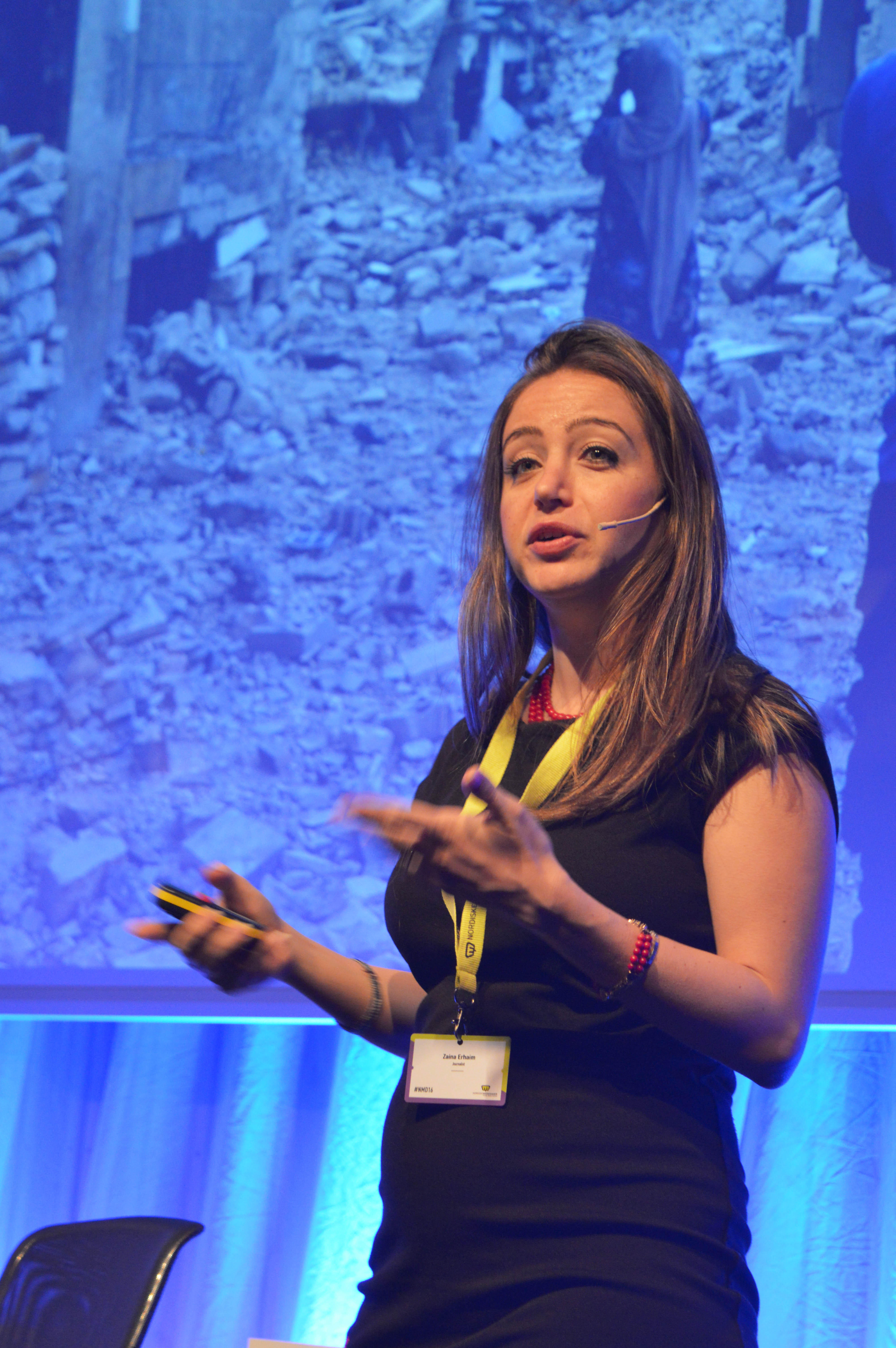 Medvirkende: Zaina Erhaim Moderator: Pål T. Jørgensen